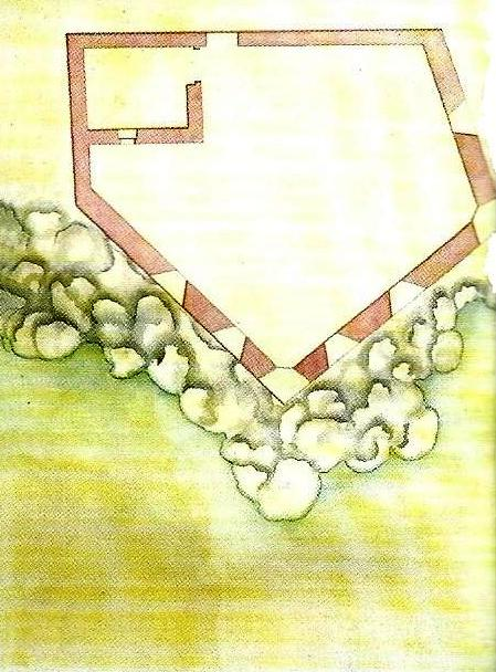 Forte de São Filipe. MACHADO, Francisco Xavier. "Revista dos Fortes e Redutos da Ilha Terceira" (1772). in MARTINS, José Salgado, "Património Edificado da Ilha Terceira: o Passado e o Presente". Separata da "Atlântida", vol. LII, 2007. p. 42.